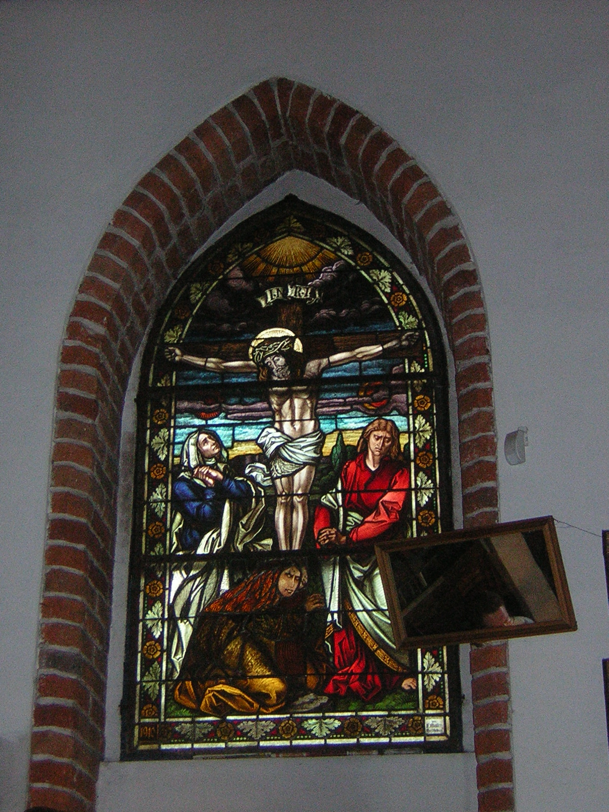 Witraż w Kościele Przemienienia Pańskiego w Iławie (fragment}